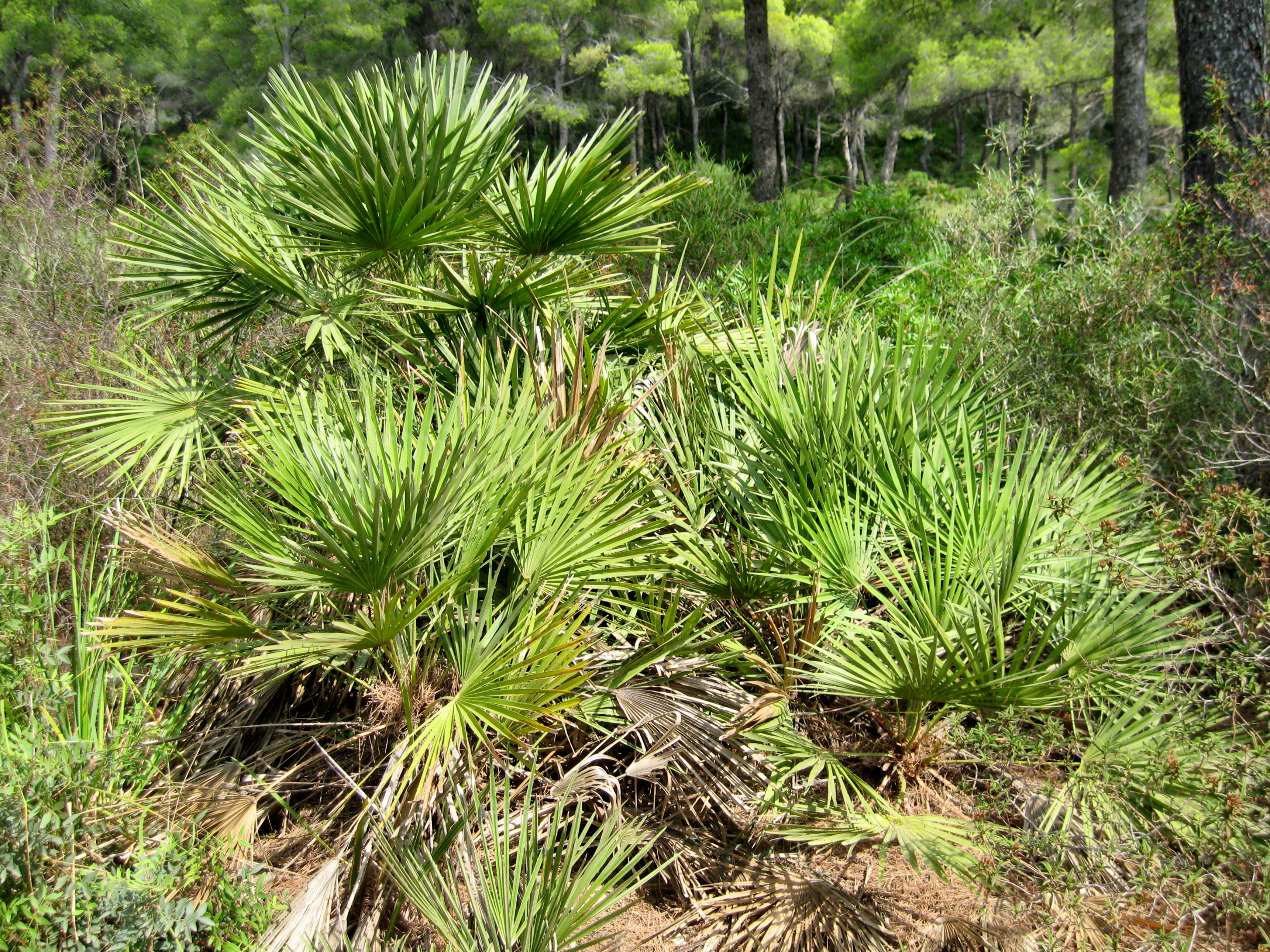 Zwergpalme (Chamaerops humilis) am Camí de Coll de Marina an der Nordostküste von Mallorca (Gemeinde Capdepera), Spanien